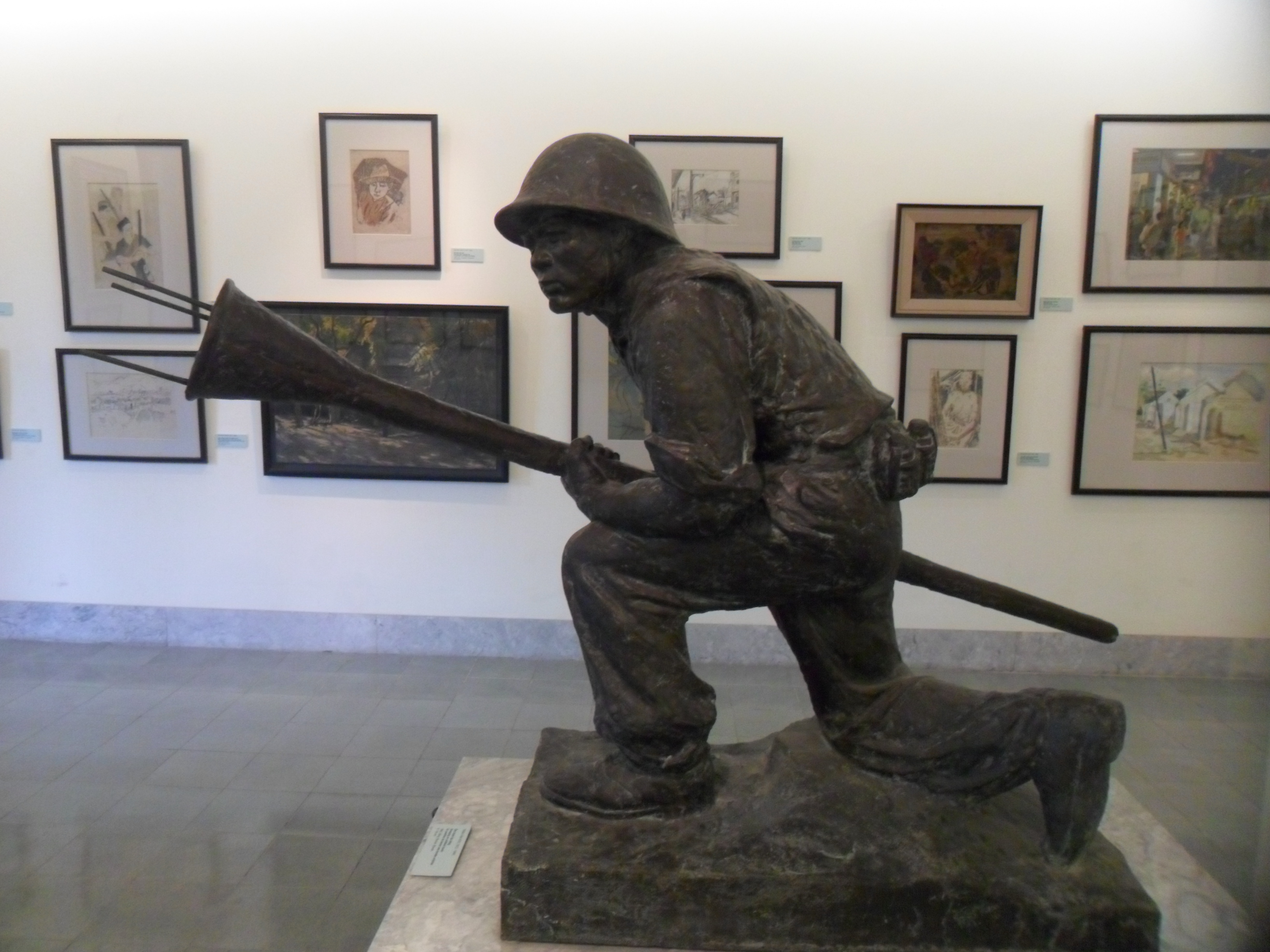 Tượng đồng Chiến-sĩ ôm bom-ba-càng của điêu-khắc gia Trần-văn-Hòe, cao 104 cm.